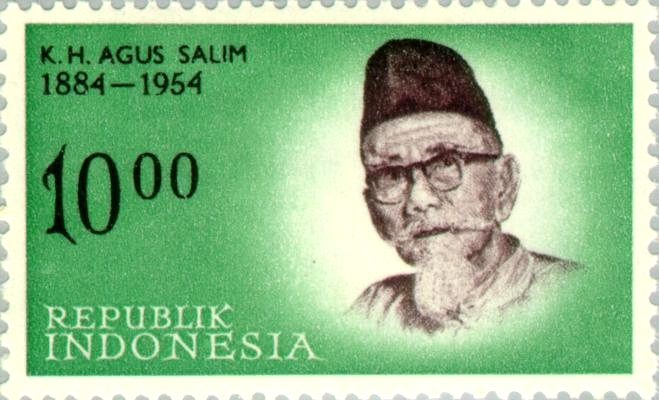 Agus Salim